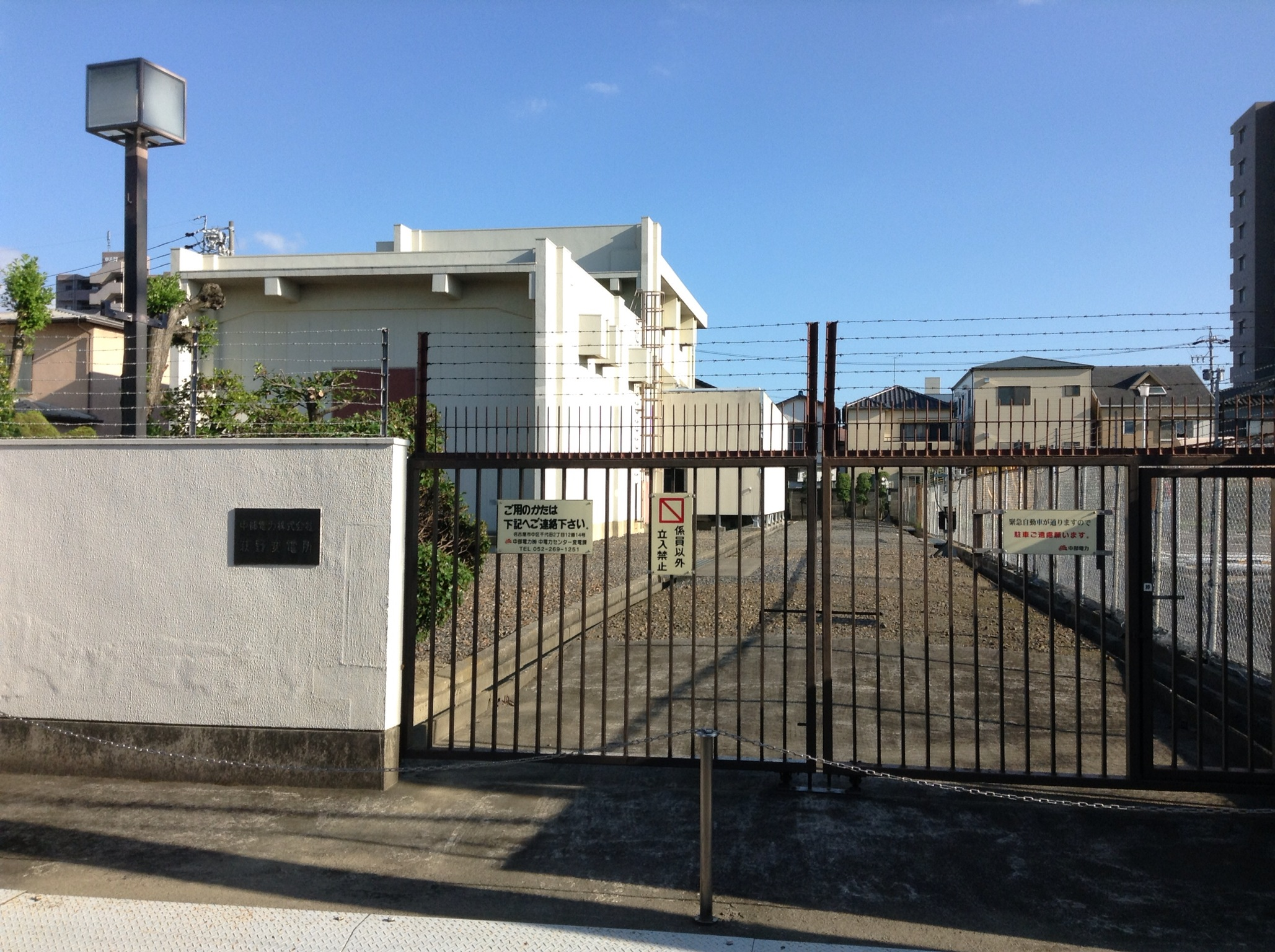 名古屋市北区大野町の中部電力萩野変電所を北側公道から写す